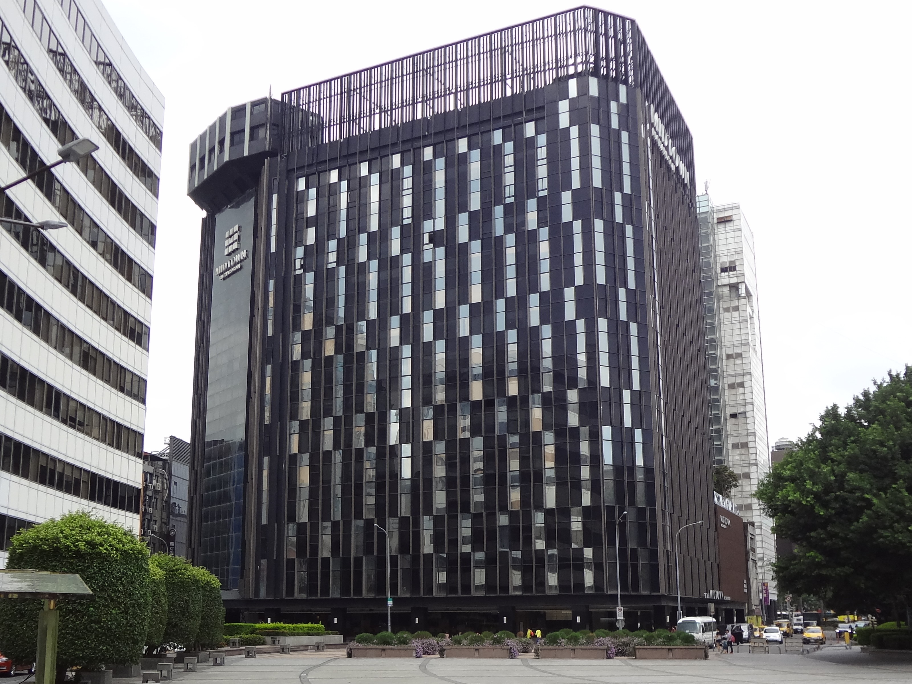 從臺北市中山堂廣場仰望新生報業廣場，部分樓層已改為城市商旅德立莊分館。